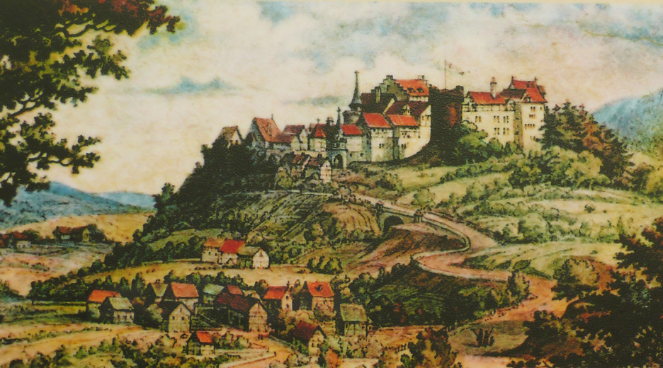 Historische Darstellung Burg Löwenstein